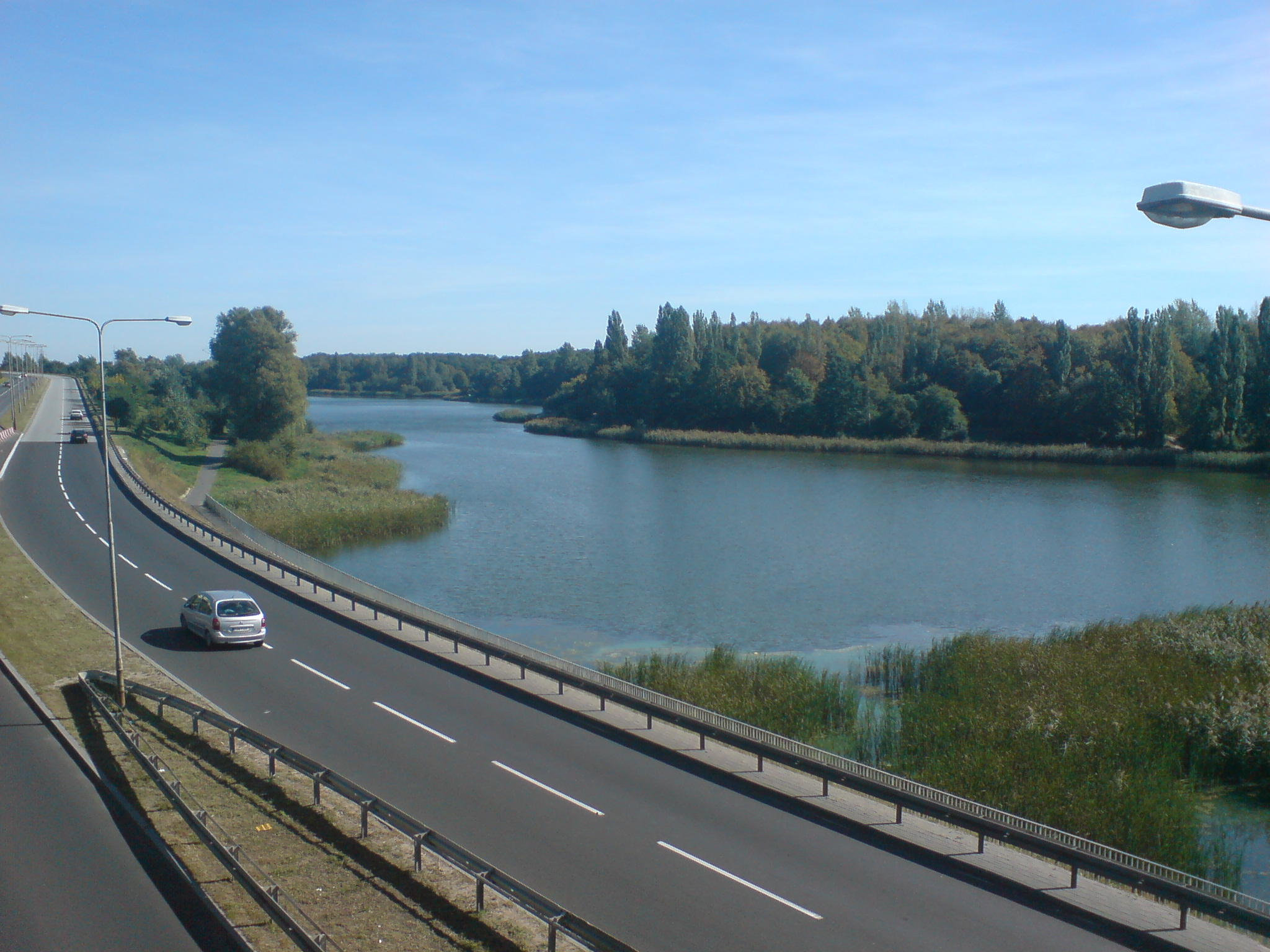 Jezioro Winiary z widokiem na Trasę Tysiąclecia i osiedle Tysiąclecia